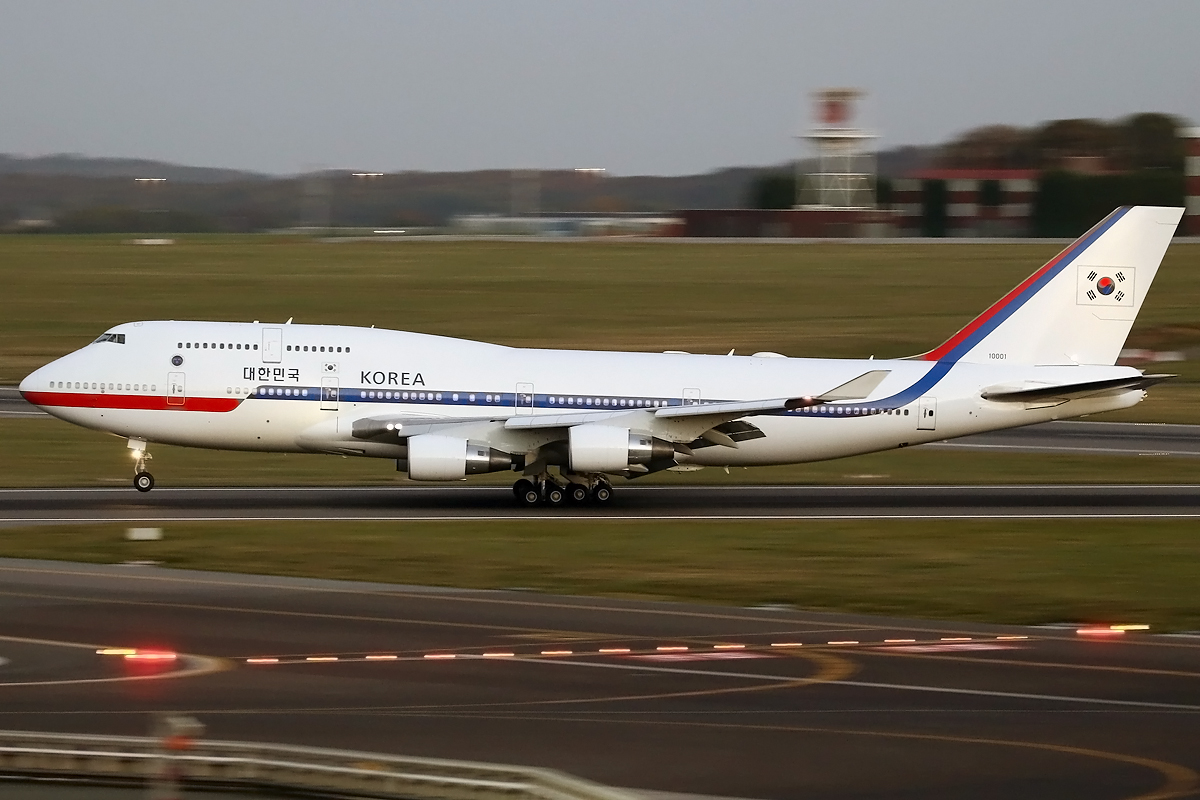 EBBR